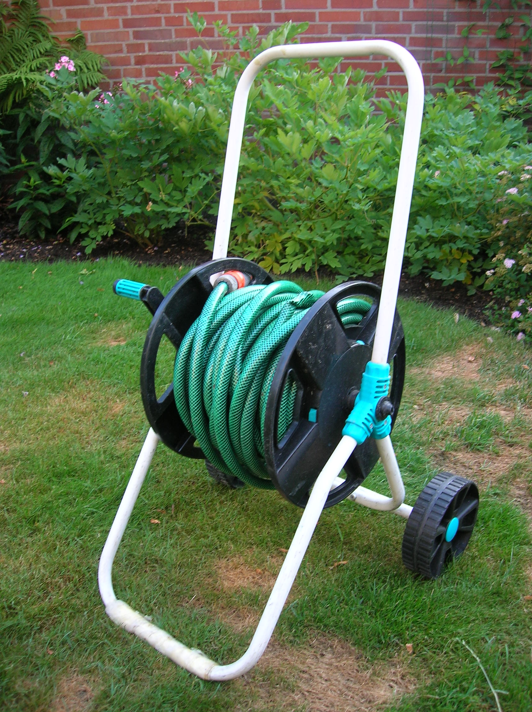 Een nog opgerolde tuinslang in de tuin van een woonhuis.